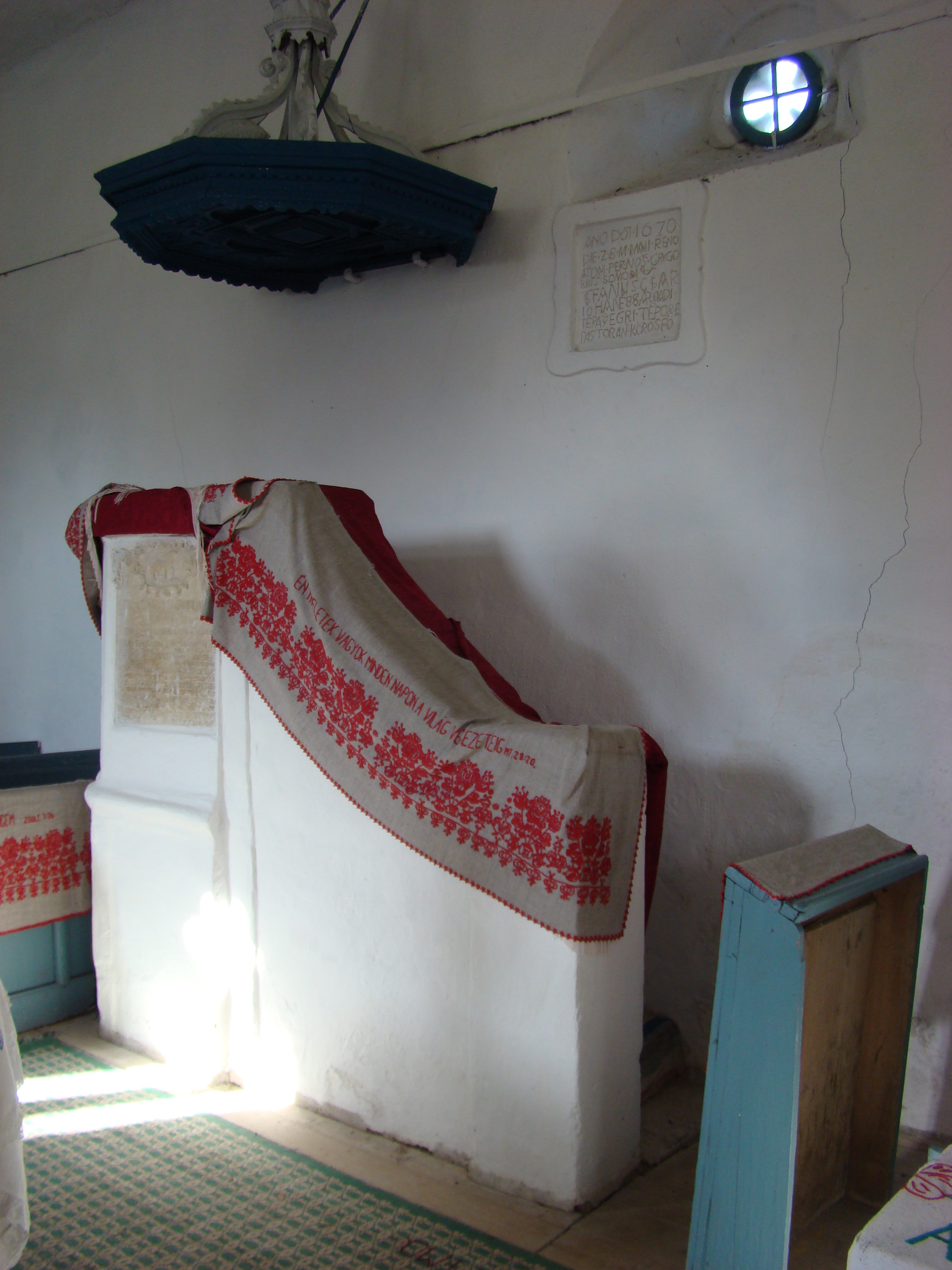 Biserica reformată din Boteni, județul Cluj